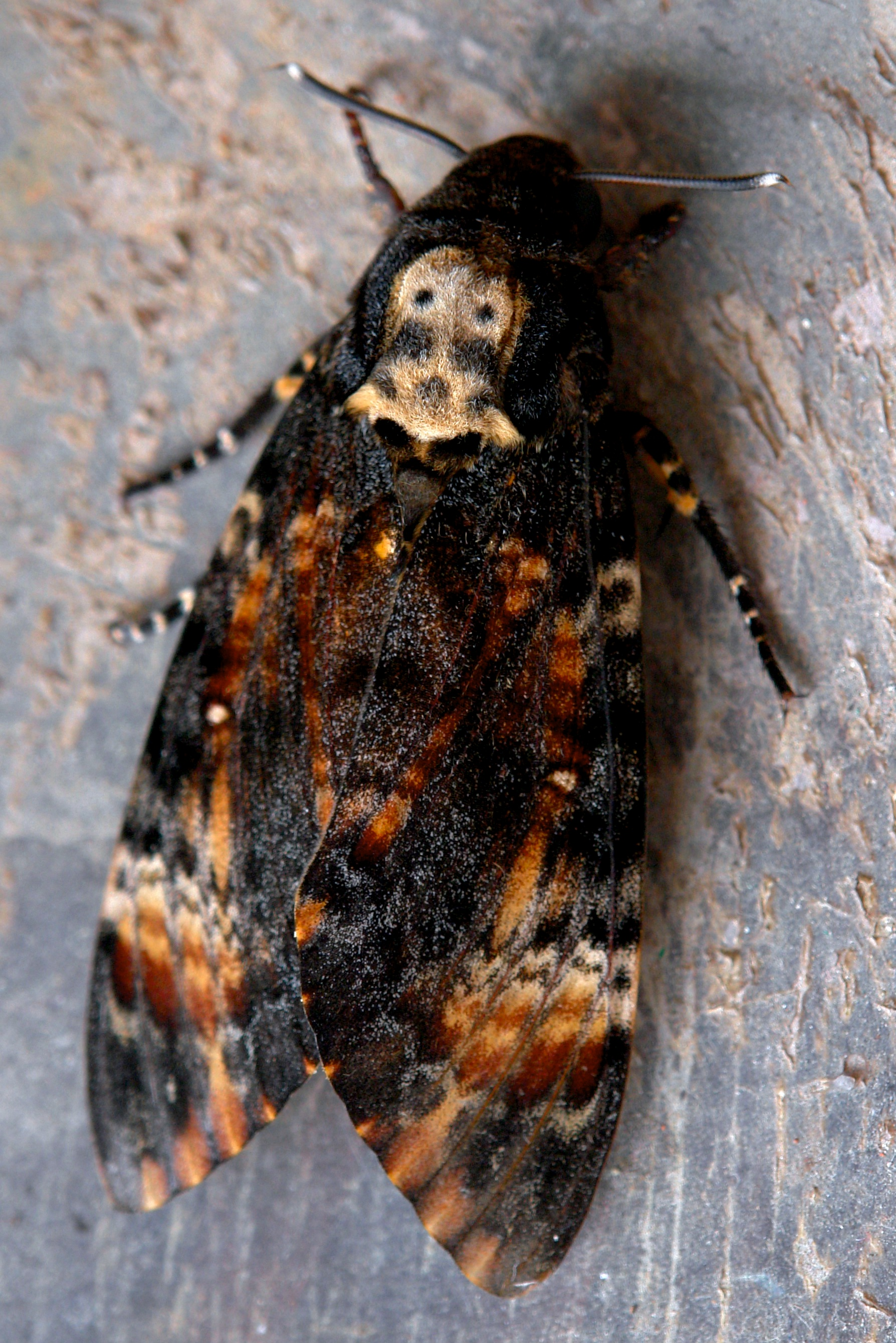 autore: Luca Losito fonte: Portfolio personale DeviantArt descrizione: Acherontia Atropos licenza d'uso: GFDL note